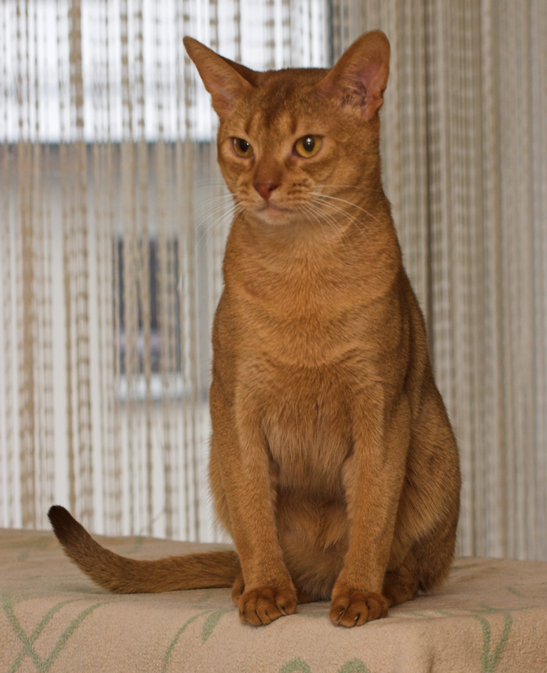 Cedarwood Sethos, Abessinierkater sorrel